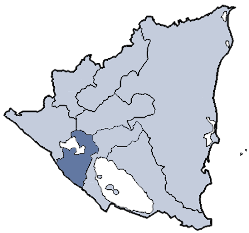 Mappa dell'arcidiocesi cattolica di Managua, in Nicaragua. Lavoro personale eseguito a partire da questa immagine di Commons. Fonte per i confini delle diocesi: Categoria:Chiesa cattolica in Nicaragua